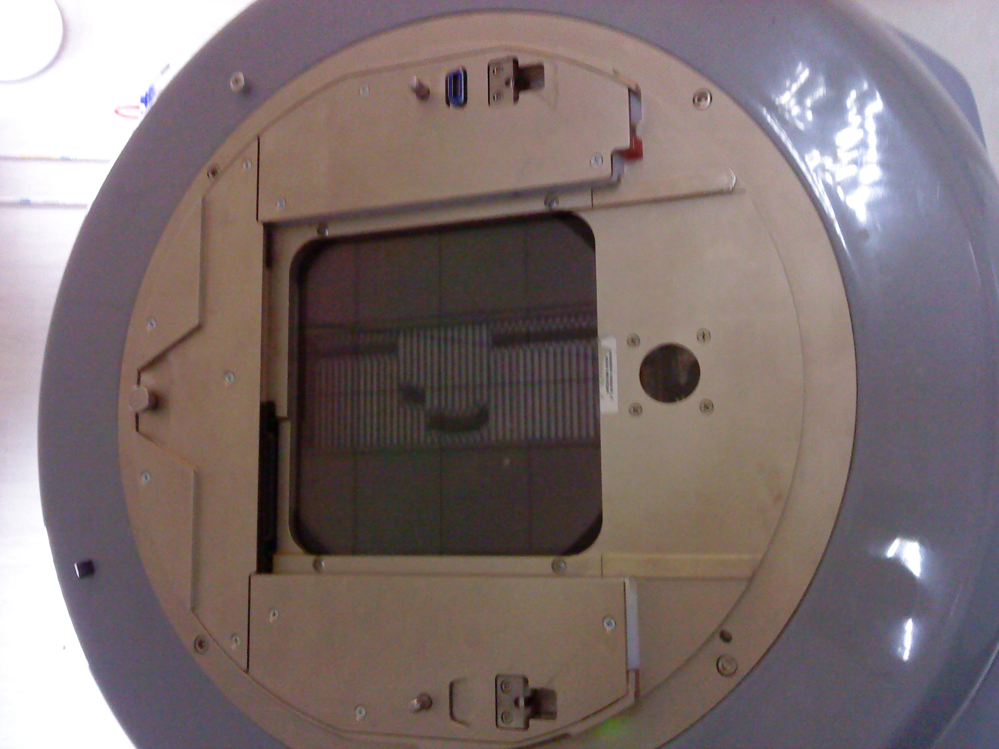 Collimateur multilames d'un accélérateur linéaire de particules en radiothérapie.